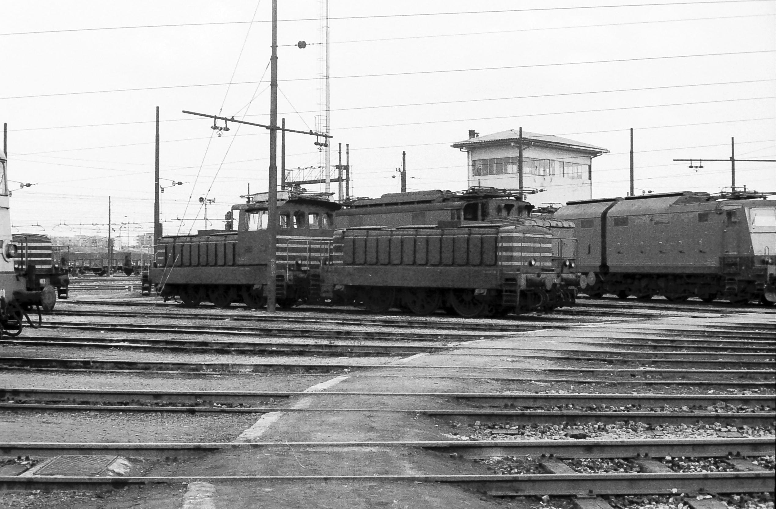 Locomotiva elettrica da manovra FS E.321.104 con unità accoppiata E.322.104 sulla rotonda del deposito locomotive di Milano Smistamento.